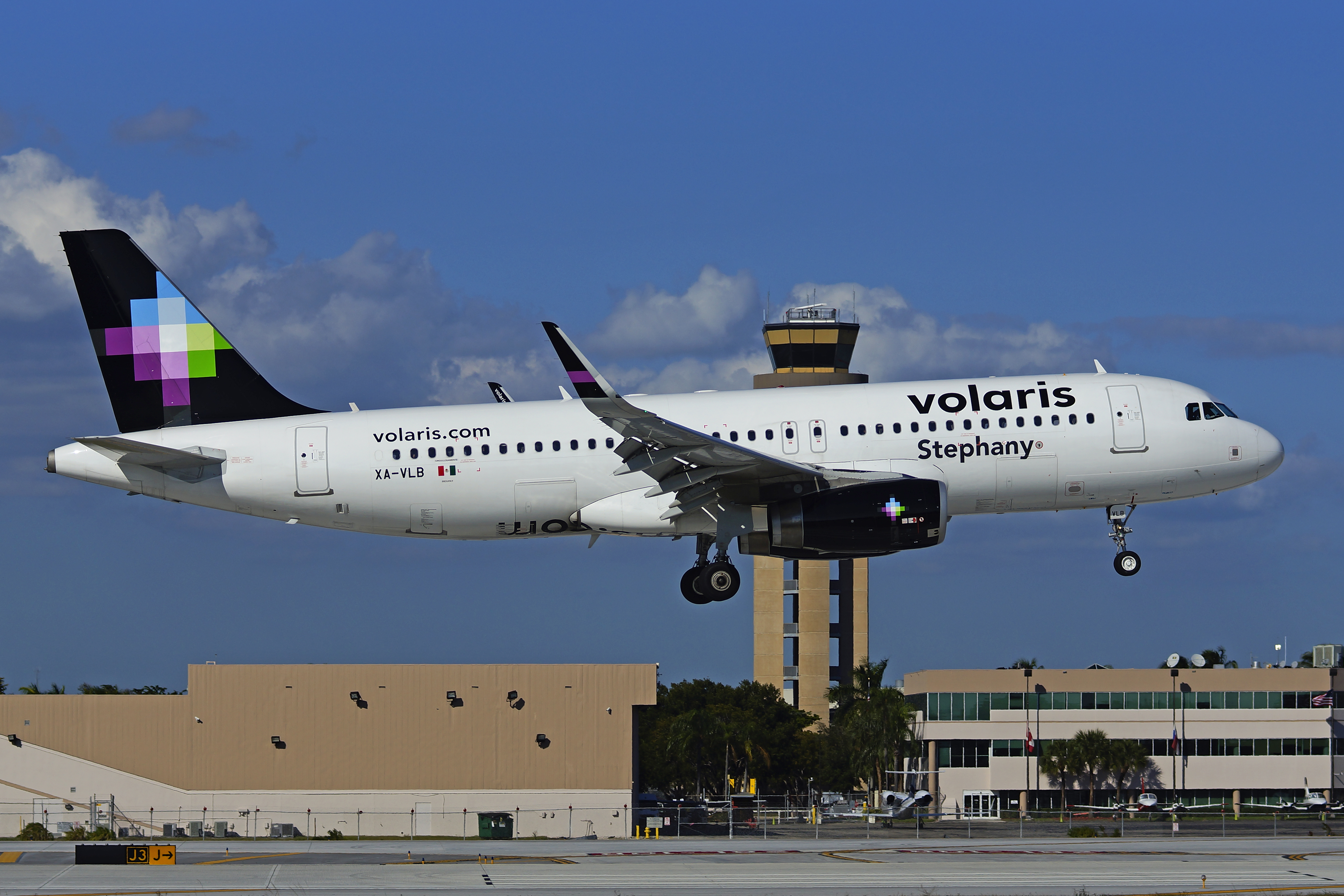 XA-VLB Volaris FLL 4x6 JTPI 10R 7737